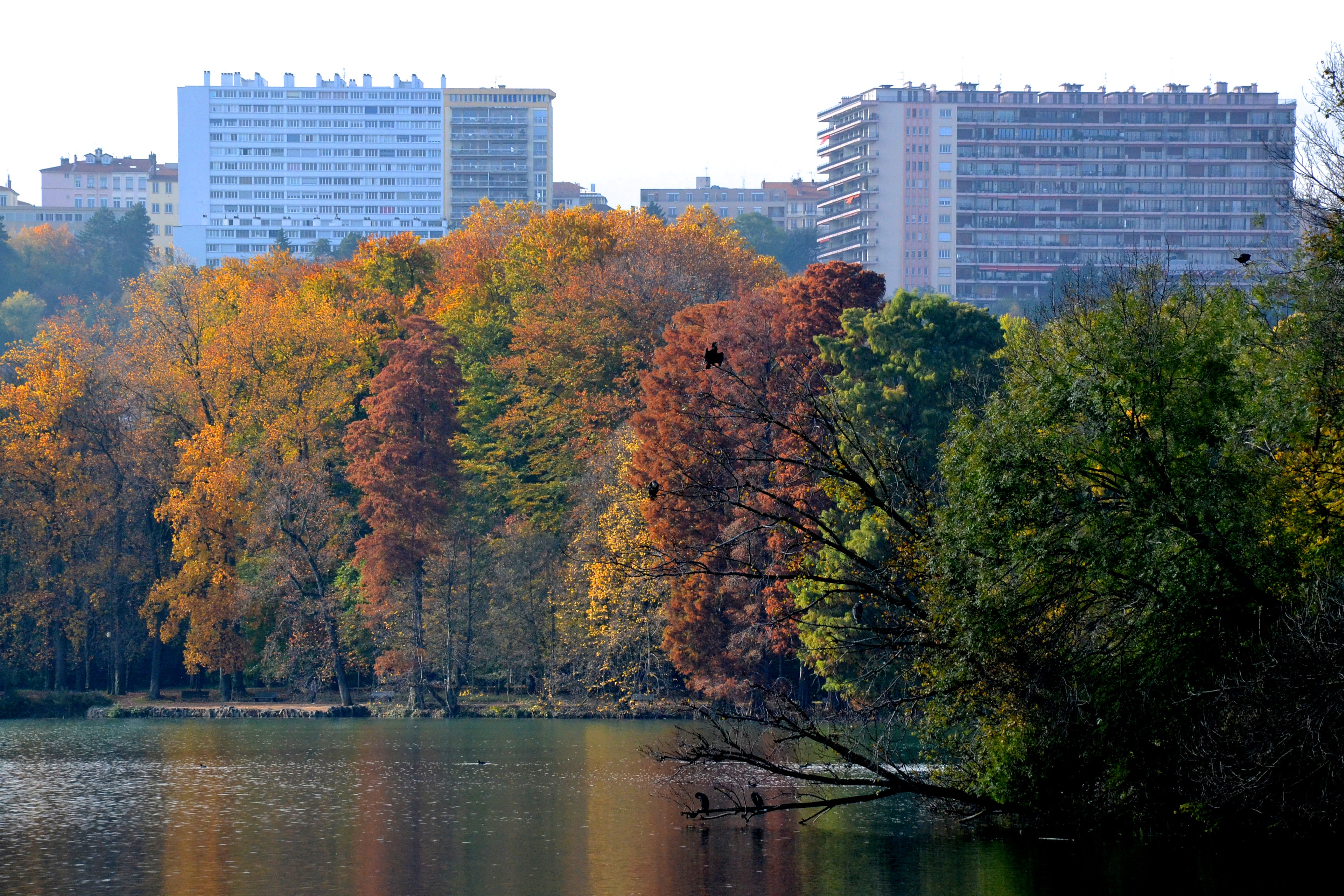 Le lac du parc de la Têt d'Or à Lyon (Rhône, France).